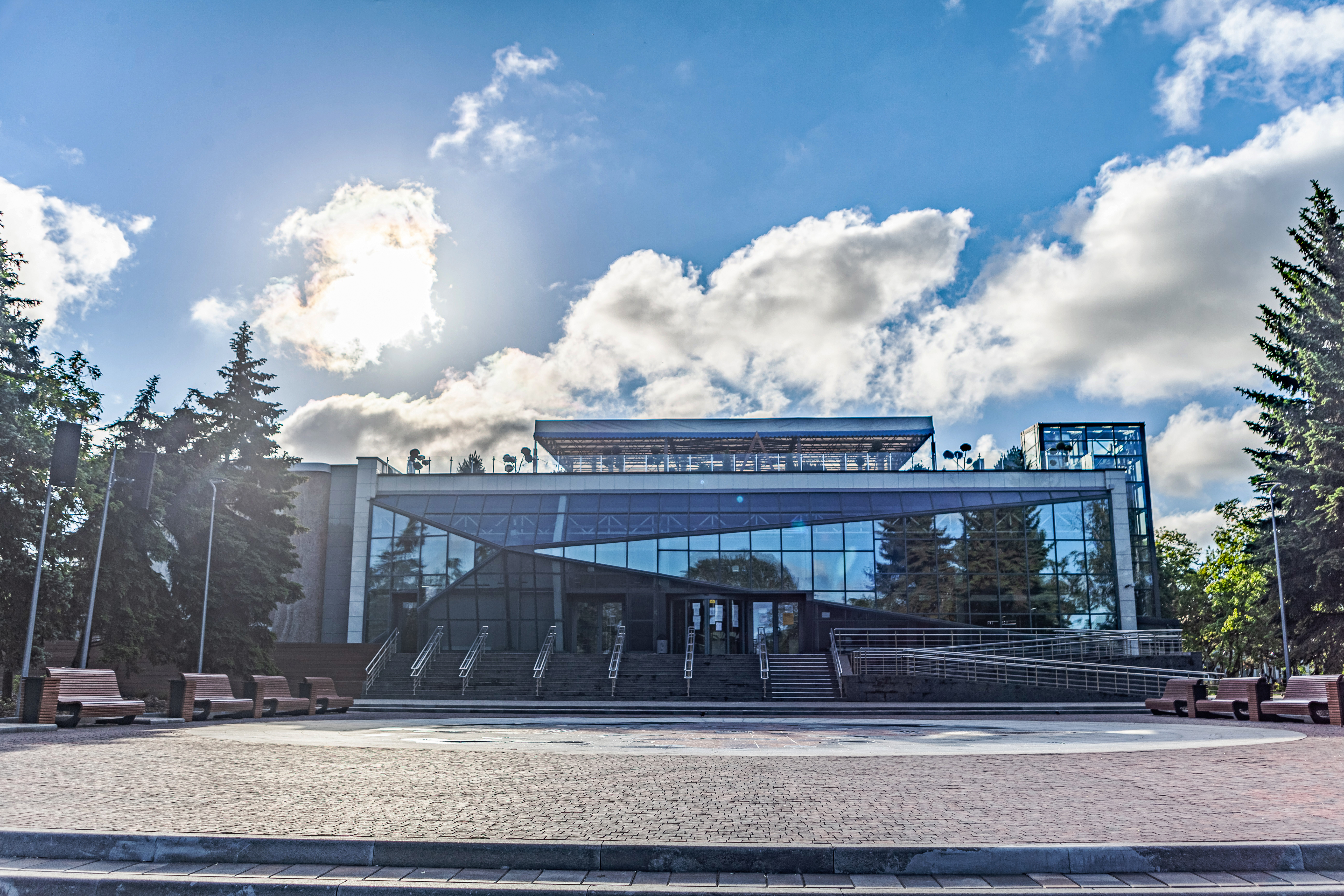 Cоціальний офіс "Мультицентр" у Лівобережному районі міста Маріуполь на вулиці Українського козацтва